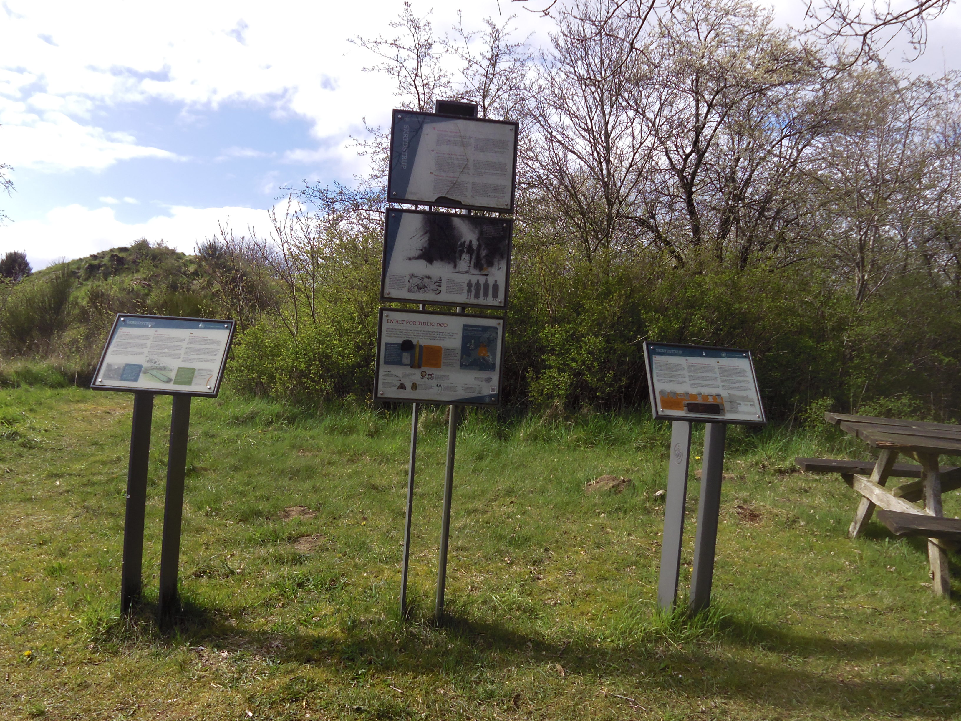 Skrydstruppigens høj